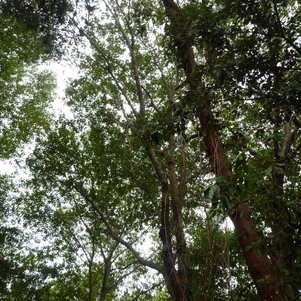 Parco Didattico di Ronchi This is a photo of a monument which is part of cultural heritage of Italy. The authorisation for taking photos of this object was provided by the World Wide Fund for Nature Italy.